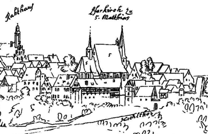 Leisnig, Ausschnitt aus der Stadtansicht von Wilhelm Dilich (um 1630)